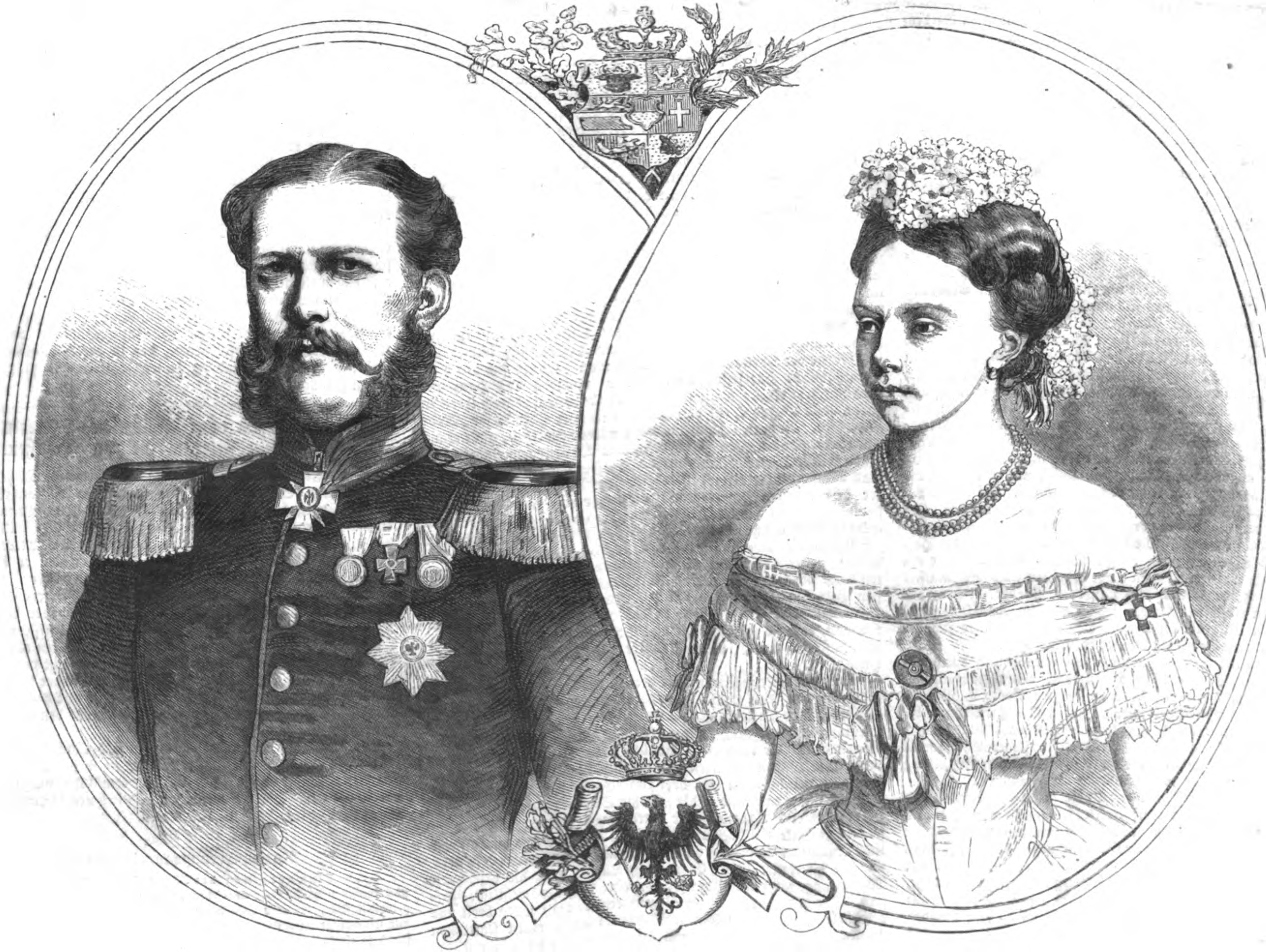 Herzog Wilhelm von Mecklenburg-Schwerin und Prinzessin Alexandrine von Preußen, Vermählung am 09.12.1865.